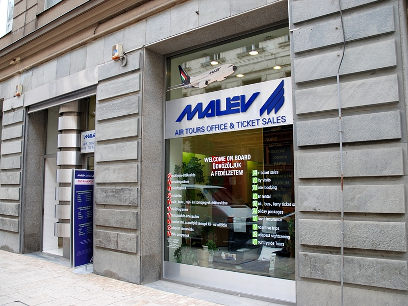 Malév utazási és jegyiroda (1052 Budapest, Petőfi Sándor utca 10.)